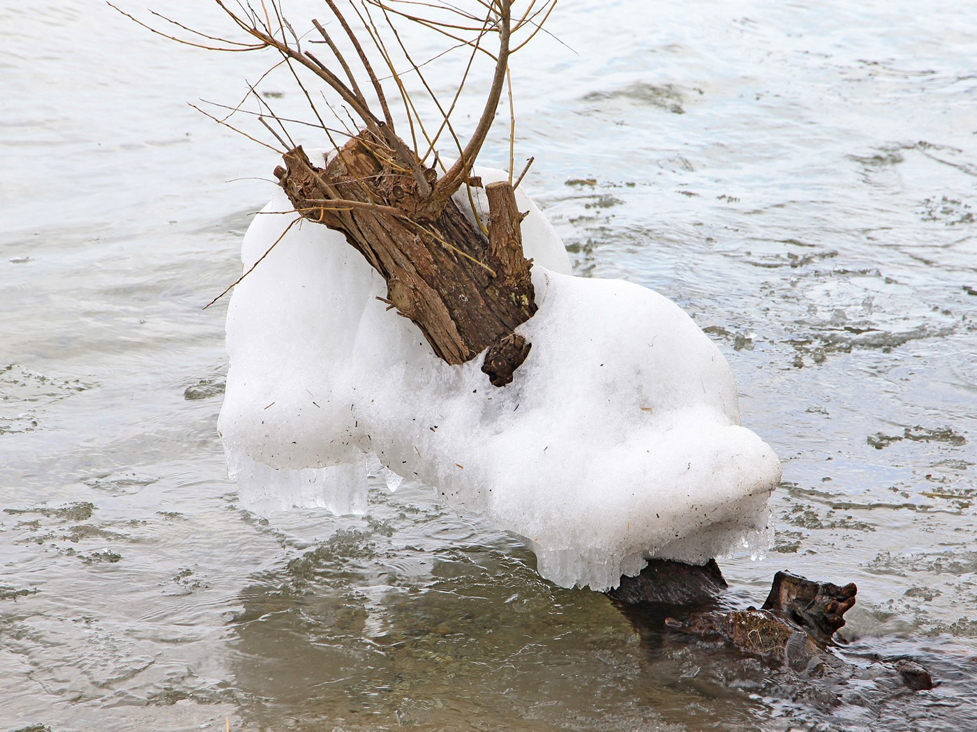 Schmelzendes Eis in Mecklenburg